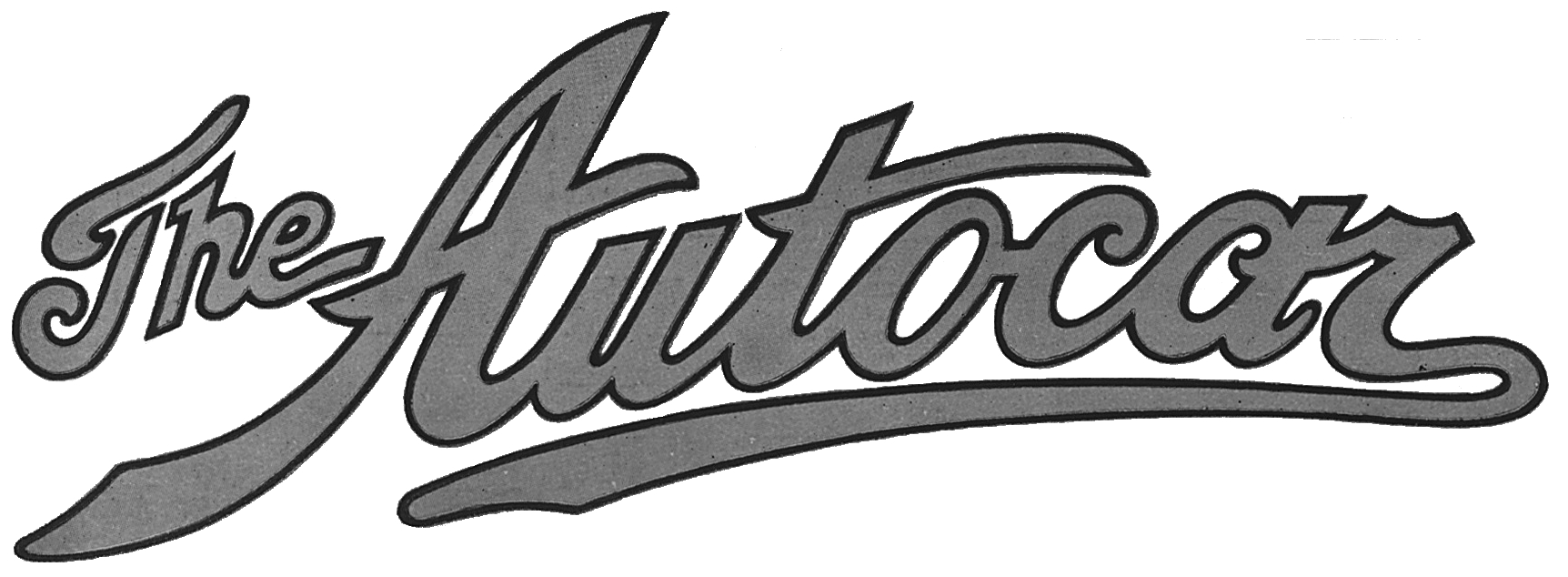 Logo de la revue "The Autocar" publiée au Royaume-Uni